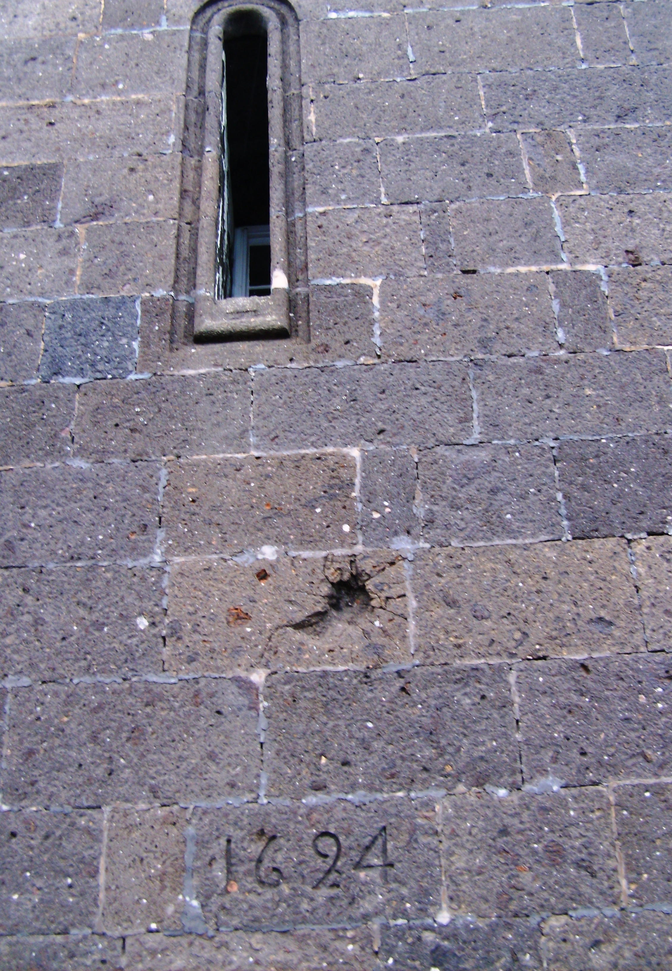 Igreja de São Miguel Arganjo, Vila Franca do Campo, ilha de São Miguel, Açores: detalhe do impacto do projétil de artilharia no alçado da torre sineira voltado para o mar. Abaixo a inscrição da data: "1624".